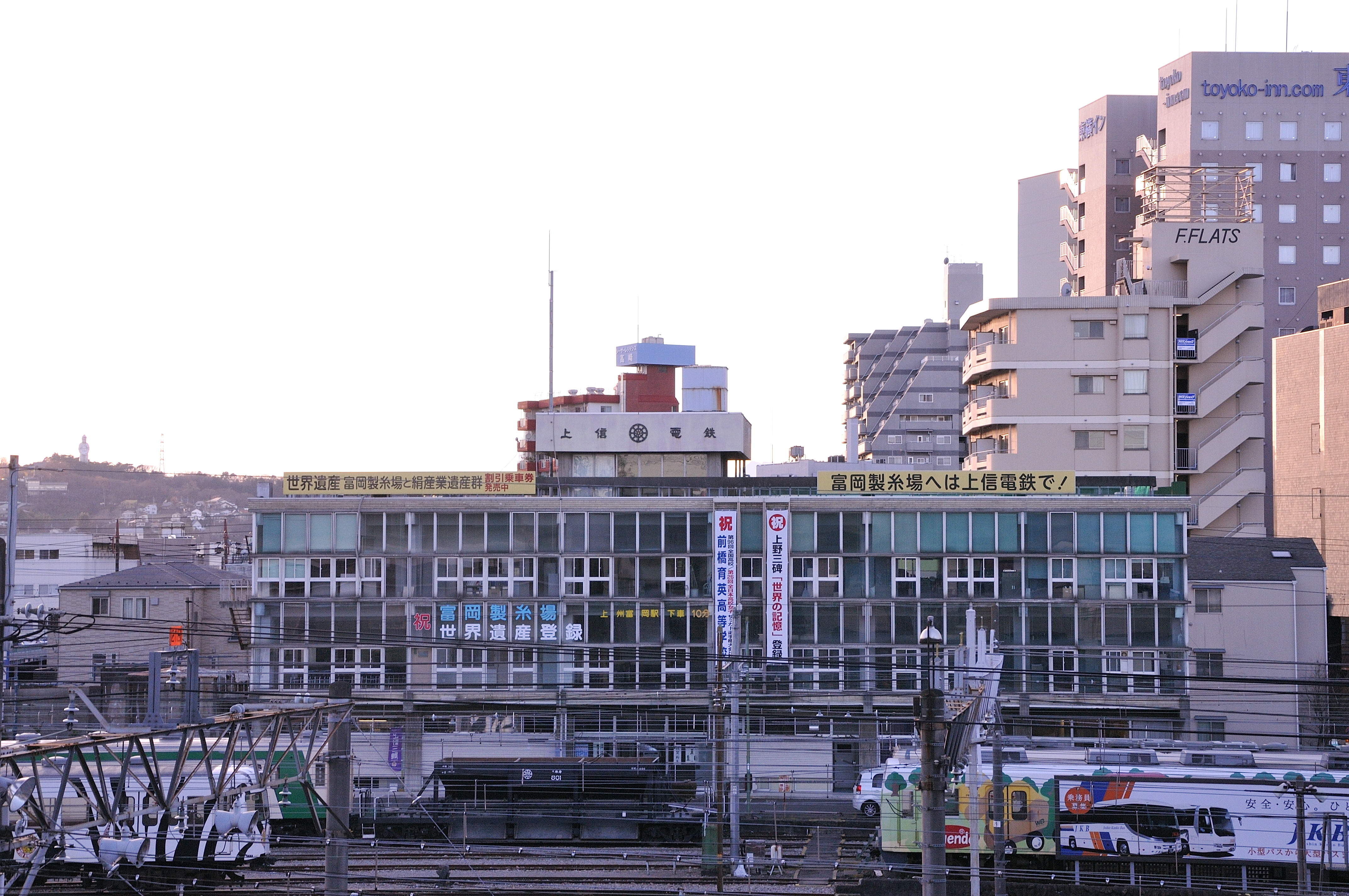 上信電鉄本社社屋。 Nikon D300